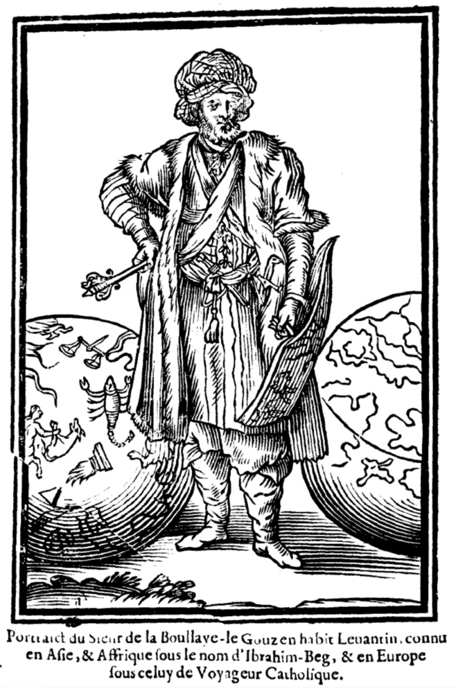 François de La Boullaye Le Gouz (1610 – 1668/1669), französischer Aristokrat und Weltreisender. Porträt aus einer 1657 erschienenen Ausgabe seines Buches Les Voyages et Observations.